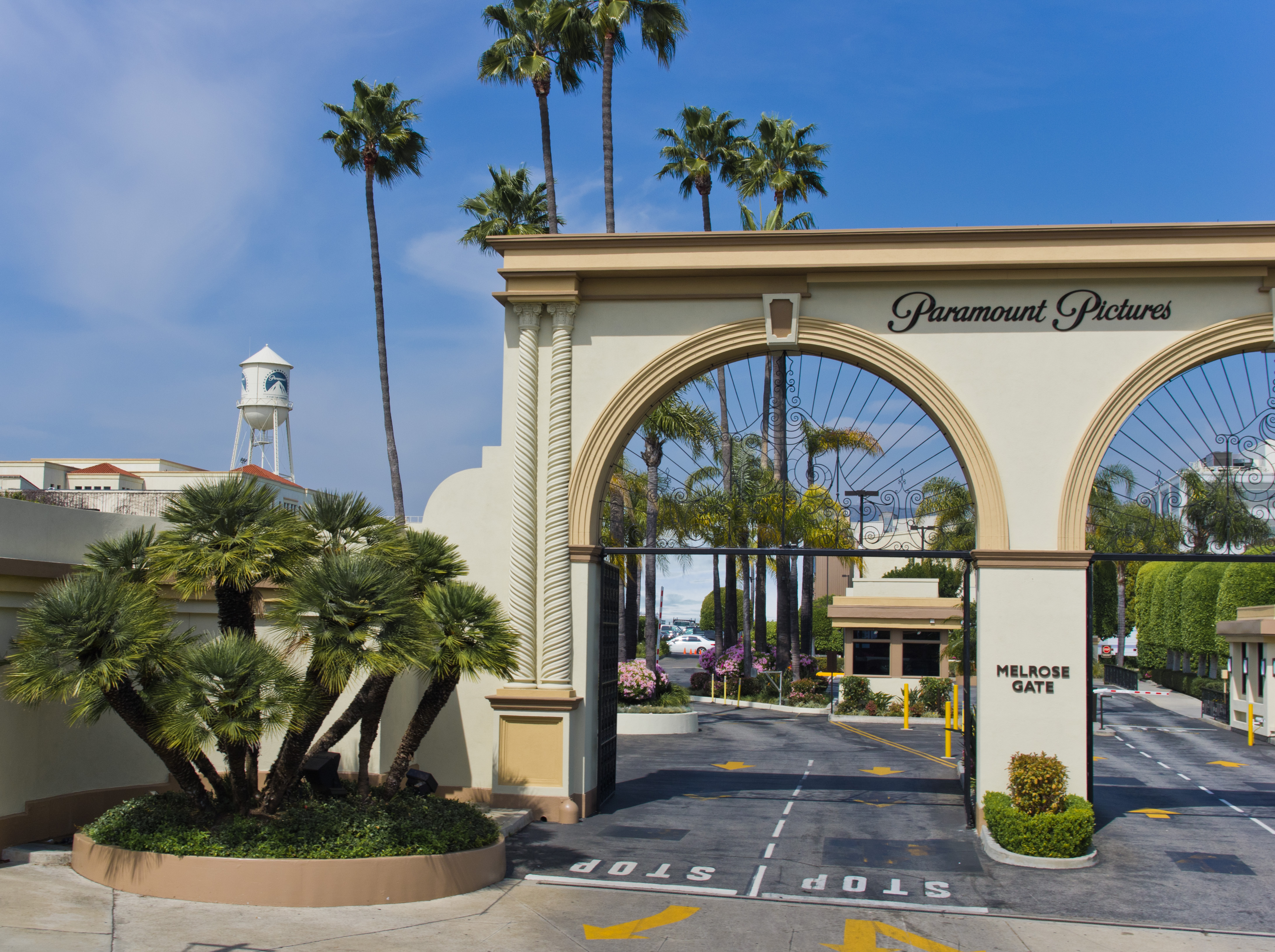 Paramount Pictures Studio, hollywood